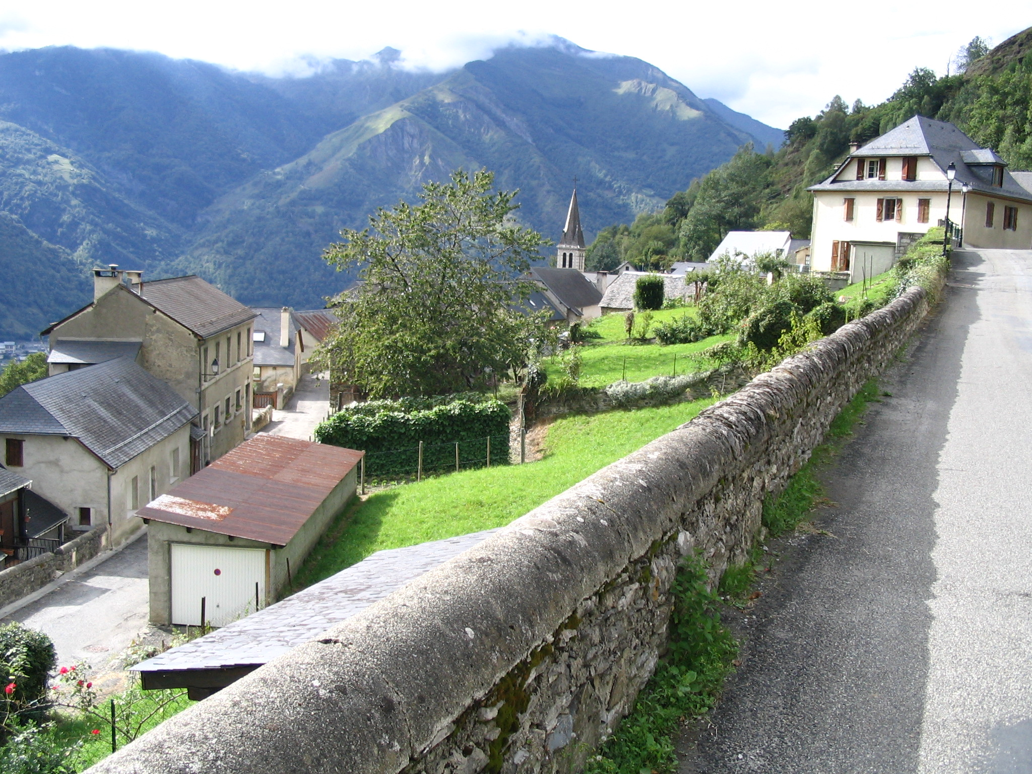 Aas - Vue générale de la route des Eaux-Bonnes Pyrénées Atlantiques - France Auteur: P.Charpiat - 2006